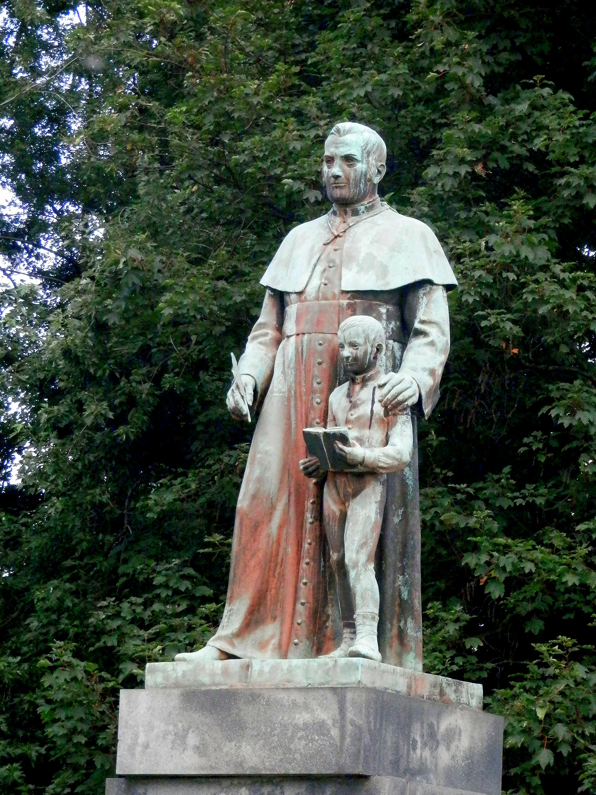 Socha A.Duchnoviča, námestie A.Duchnioviča, mesto Prešov.